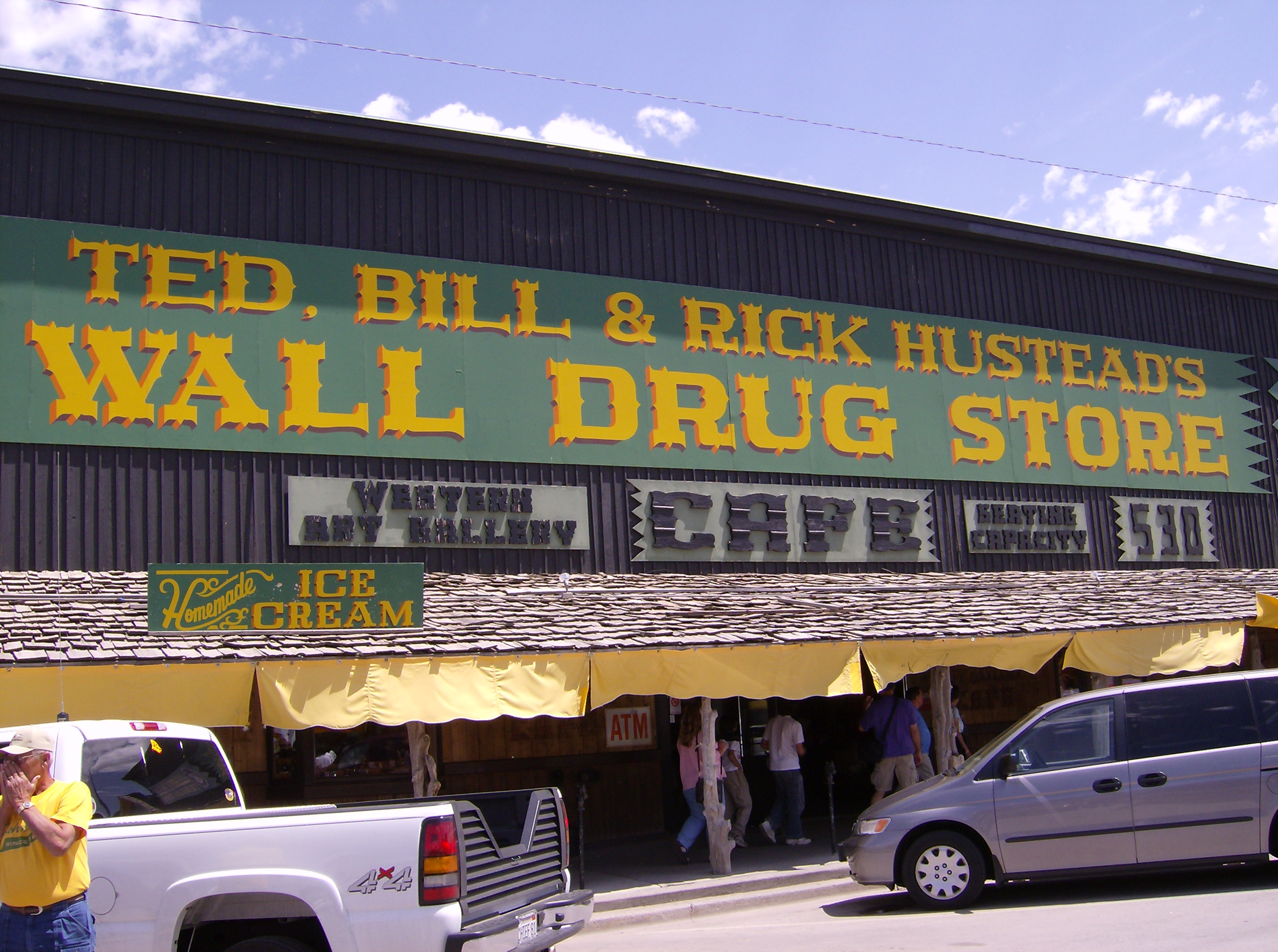 Wall Drug